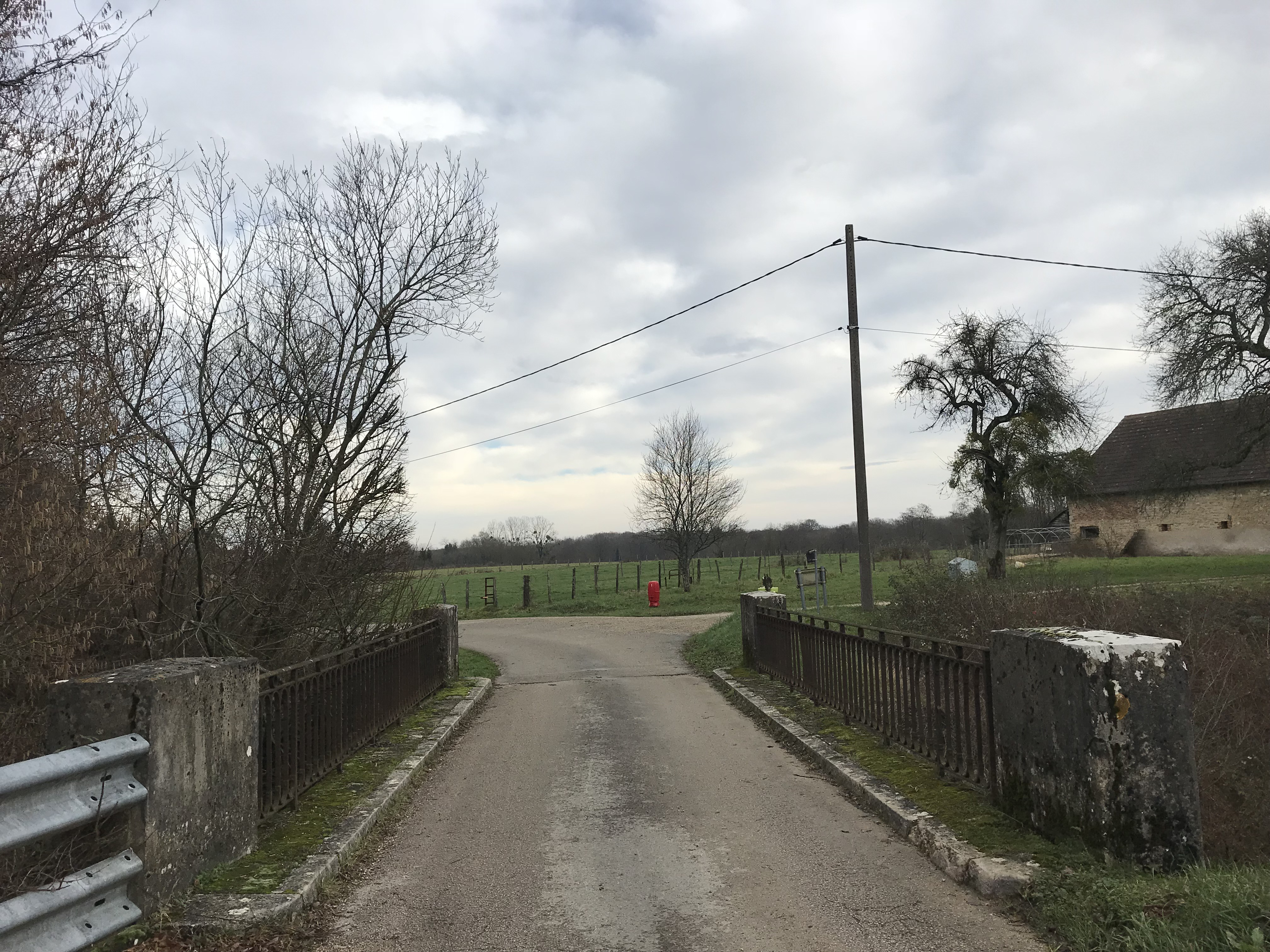 Sergenon (Jura, France) en janvier 2018.